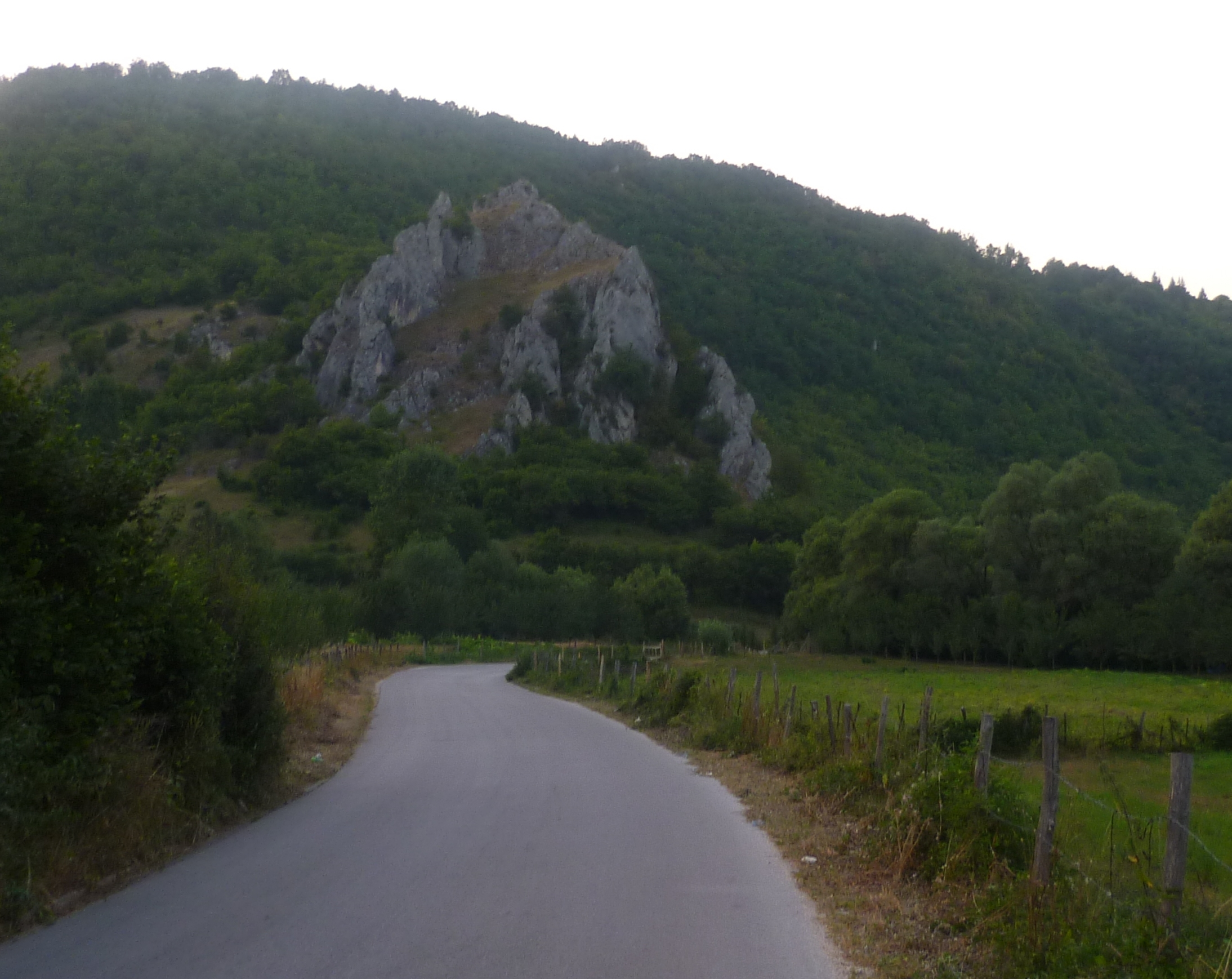 Utvrda Sutina